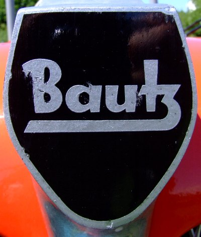 Bautz-Logo auf der Motorhaube eines Bautz 300-D, Baujahr 1960